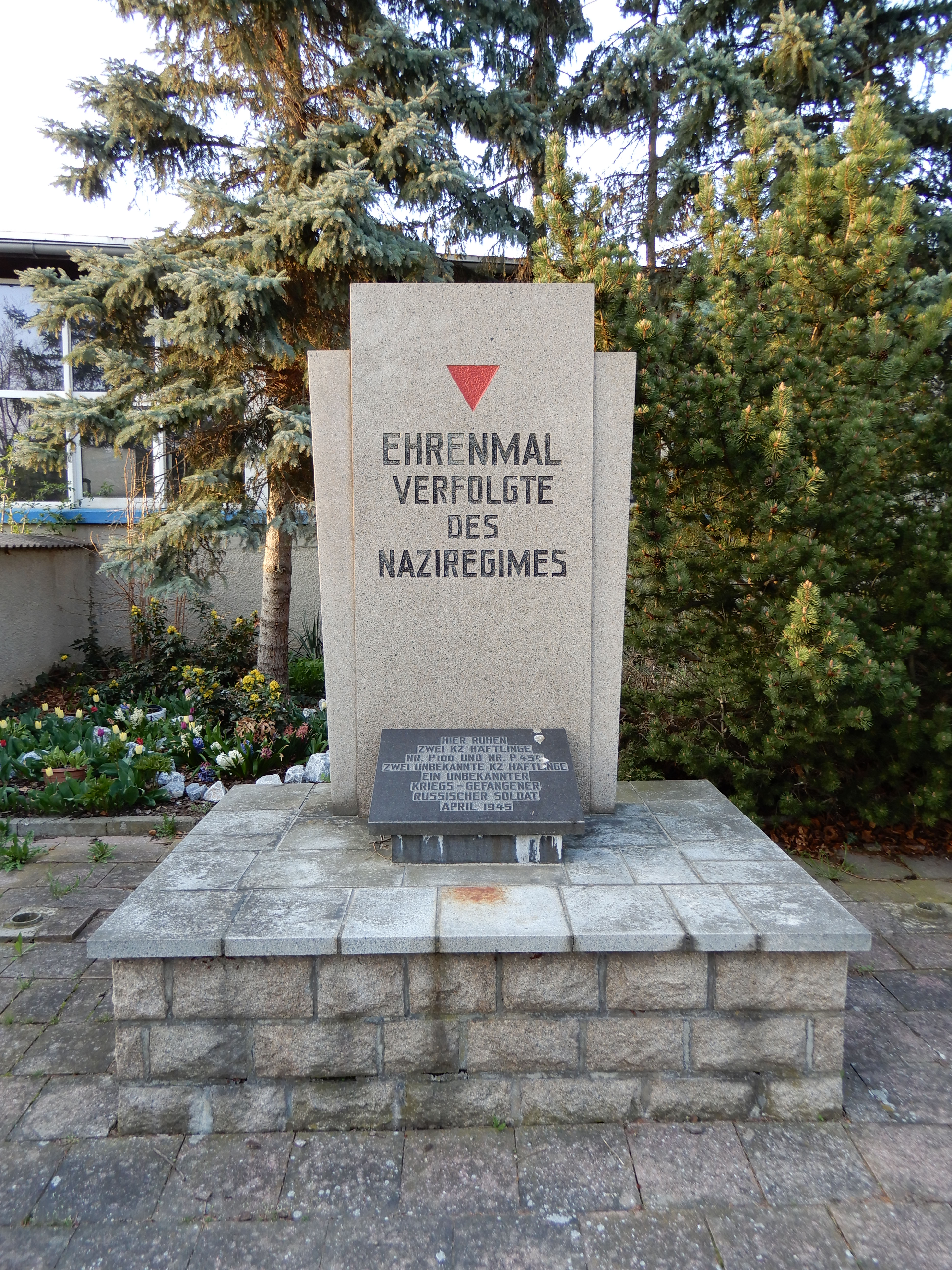 Gedenkstätte für KZ-Opfer auf dem Friedhof in Rieder